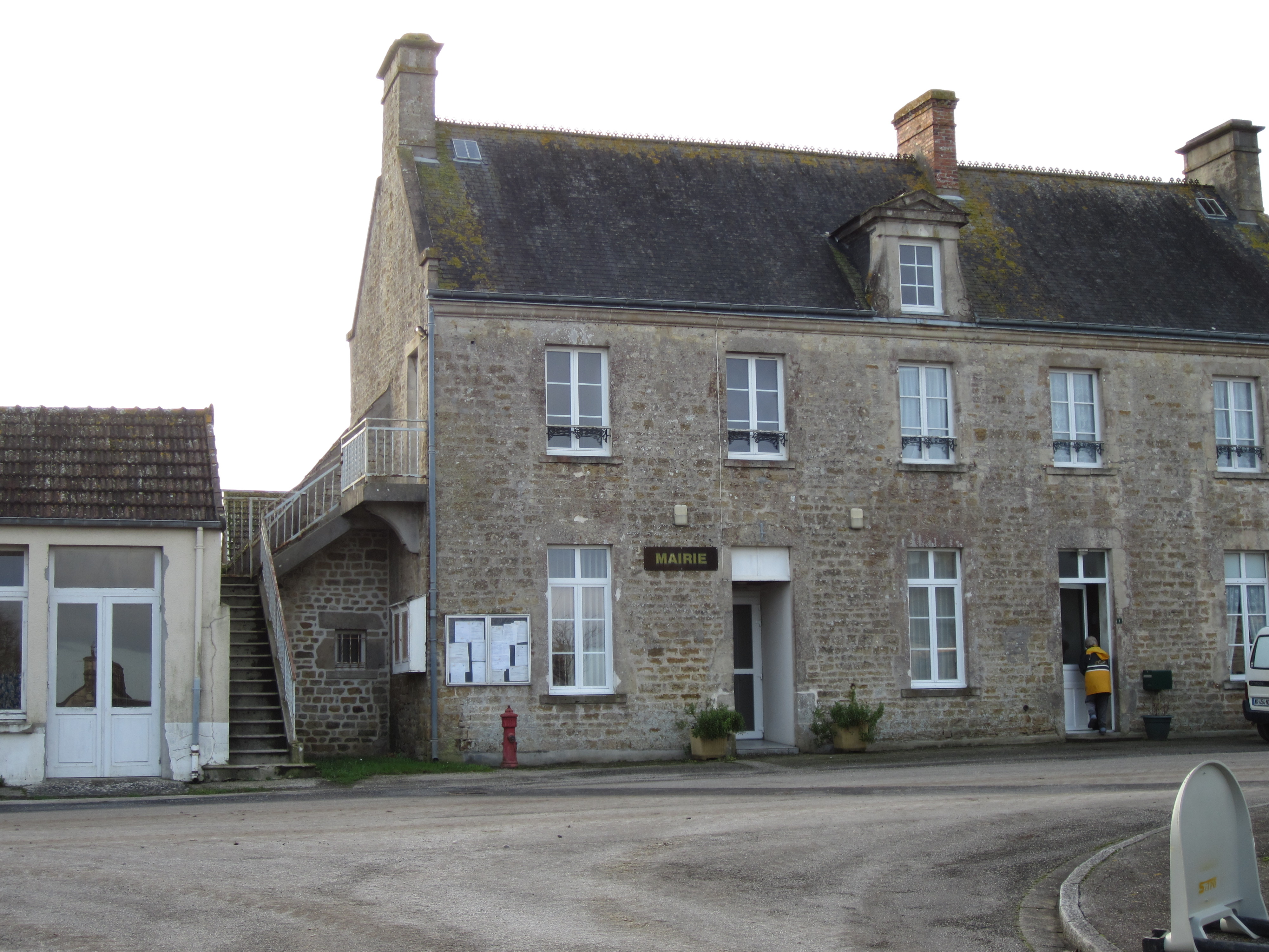 Ravenoville